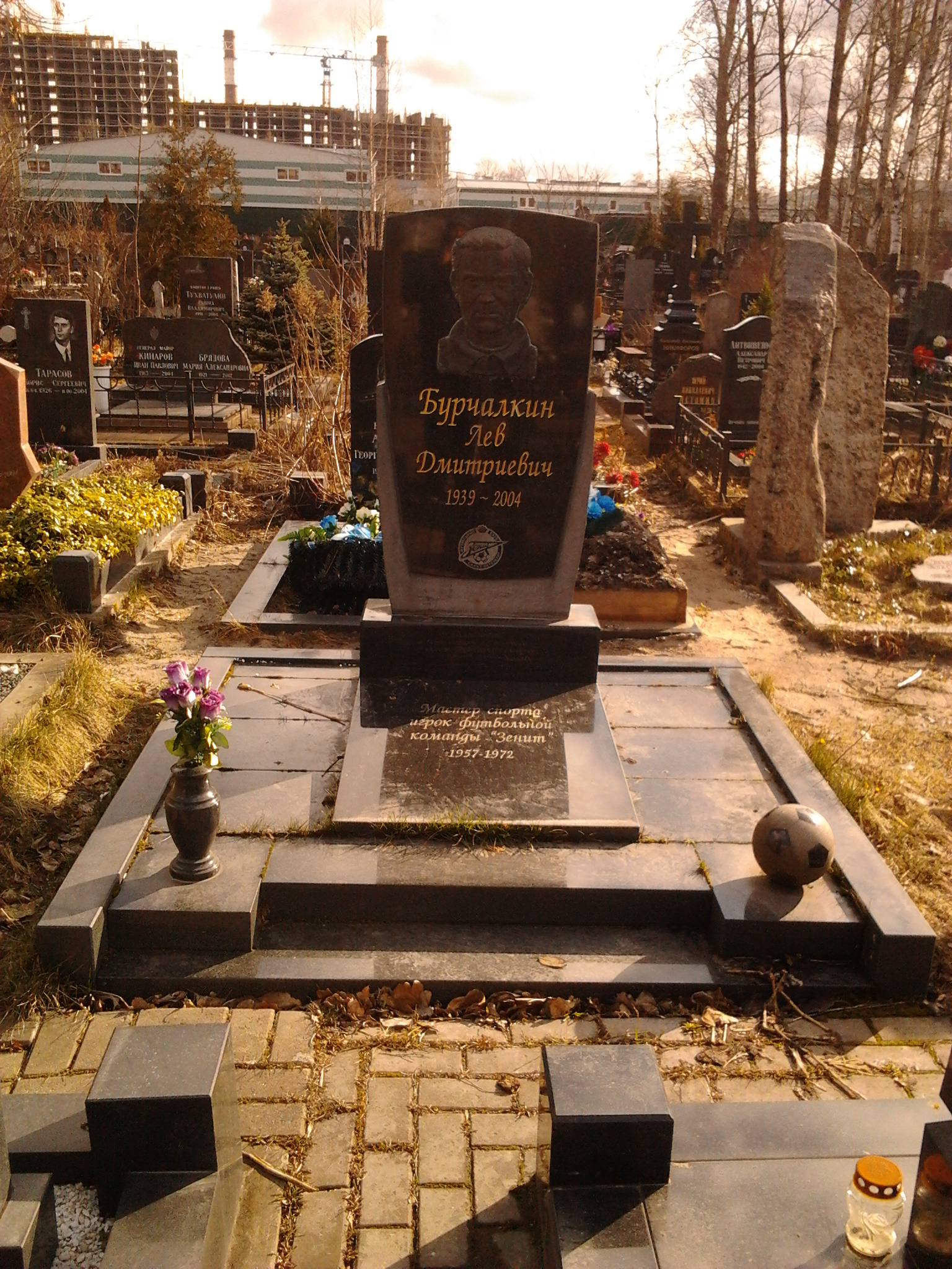 Могила Л. Д. Бурчалкина на Серафимовском кладбище Санкт-Петербурга.